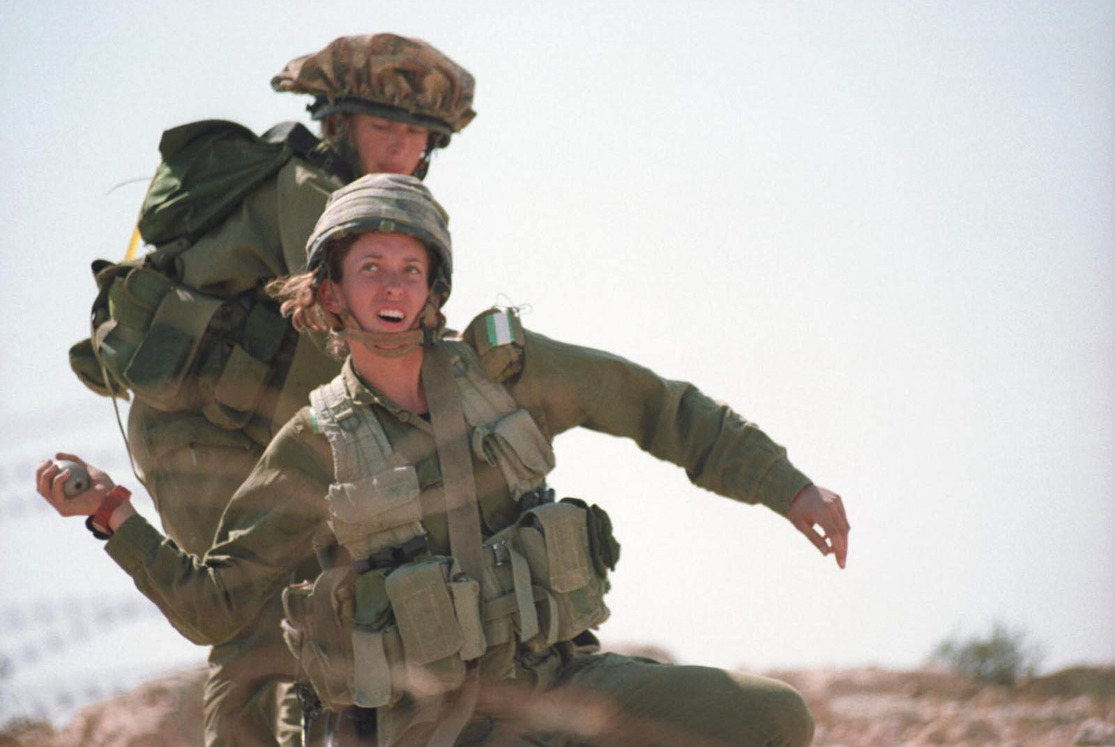 May 30, 2002. As part of the Infantry Instructors Course, female soldiers have a field training week which includes individual and group drills, navigation practice, sleeping in the field and camouflage training. כחלק משבוע אימוני השדה בקורס, מדריכות חי"ר נדרשות לעבור תרגילי יחיד וקבוצה, אימוני ניווט, שינה והסוואה בשטח ועוד. בסוף הקורס המדריכות מוצבות בתפקידים שונים כמדריכות בזרוע היבשה.